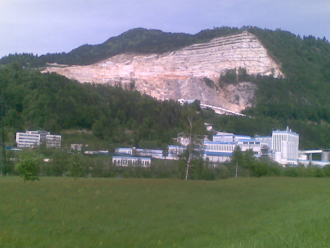 OMYA GesmbH. in Gummern